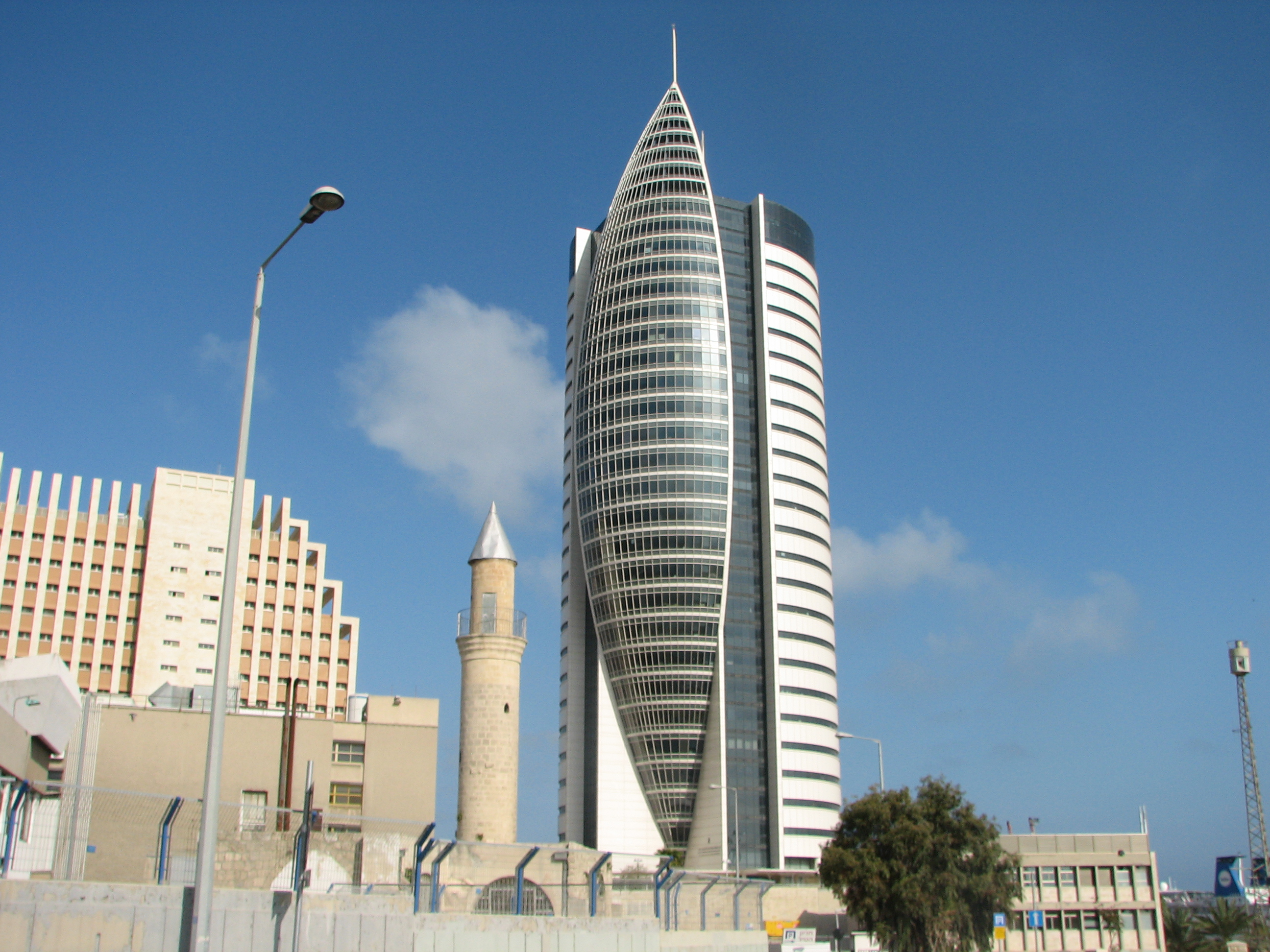 Al Zaghir Mosque, Downtwon Haifa. Was built in the 18th century. מסגד אל-זע'יר בעיר התחתית בחיפה. המסגד נבנה במאה ה-18 בימיו של דאהר אל-עומר בעיר התחתית בחיפה מגדל המפרש מימין